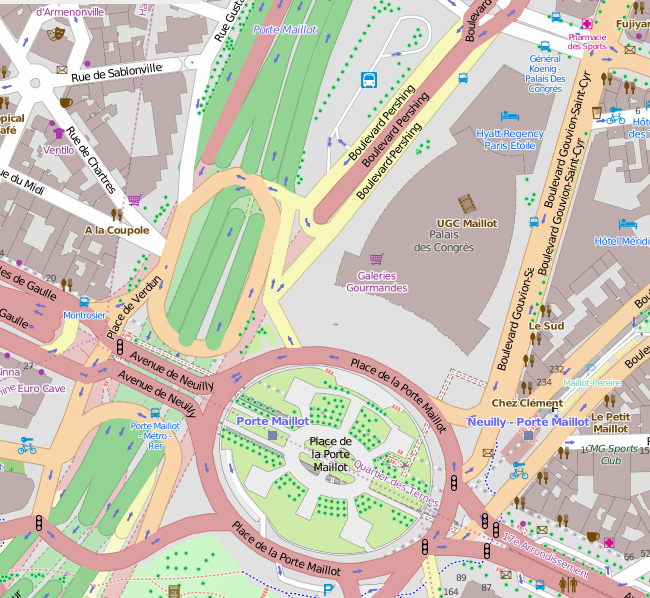 plan OpenStreetMapdde la porte Maillot, du Jardin Alexandre-Soljenitsyne et du Palais des congrès Paris 17è